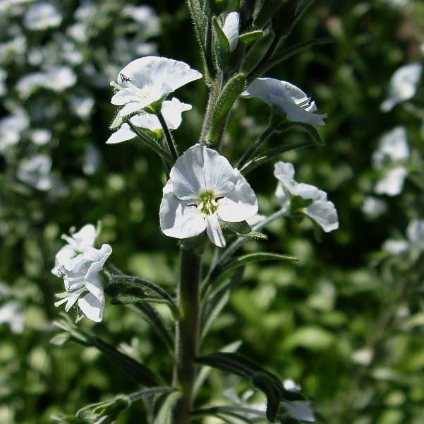 Veronica gentianoides, from Västerås Botanical garden